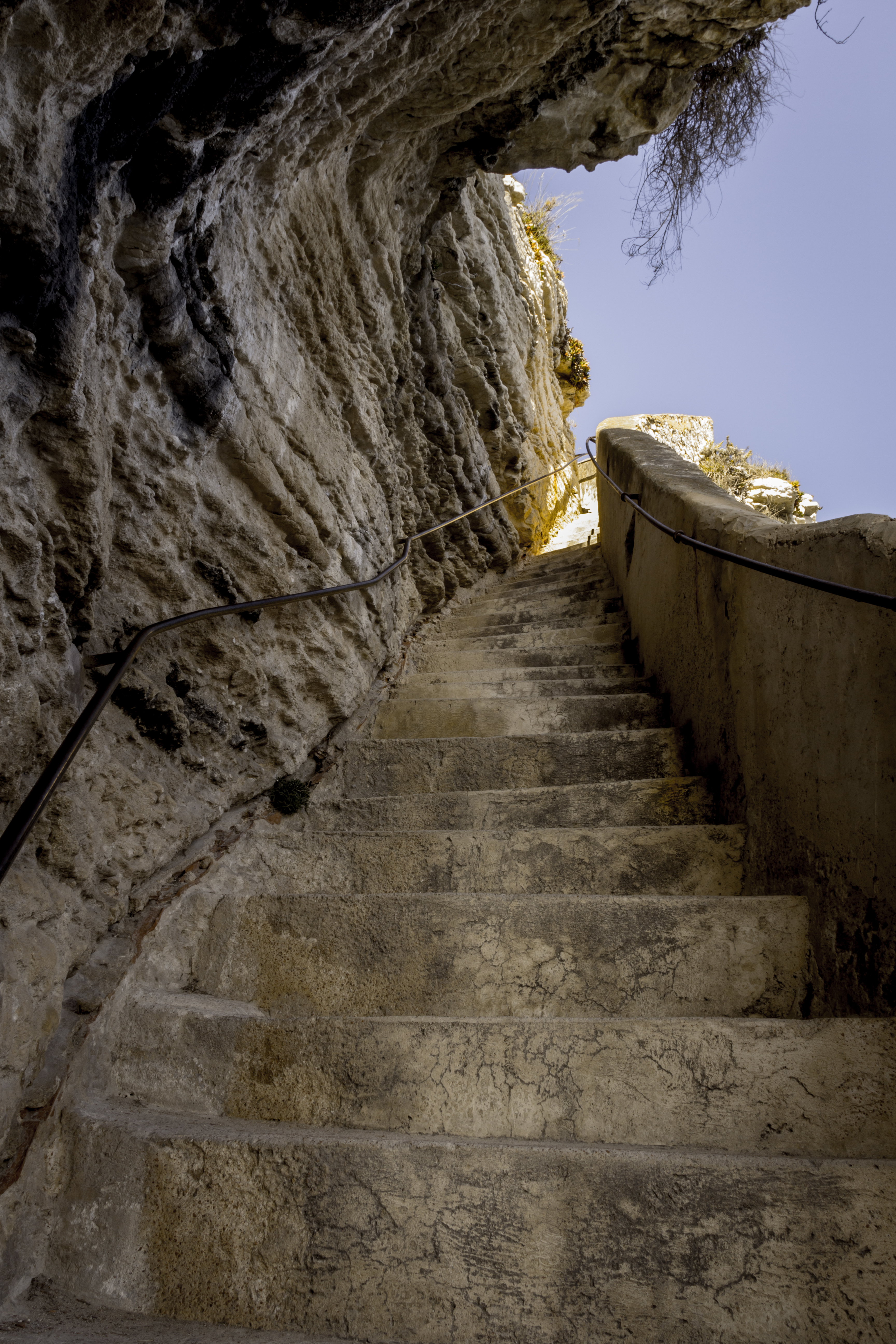 Schodiste v Bonifacio vedou k zasobarne s pitnou vodou. Vyskove prekonava 65m.